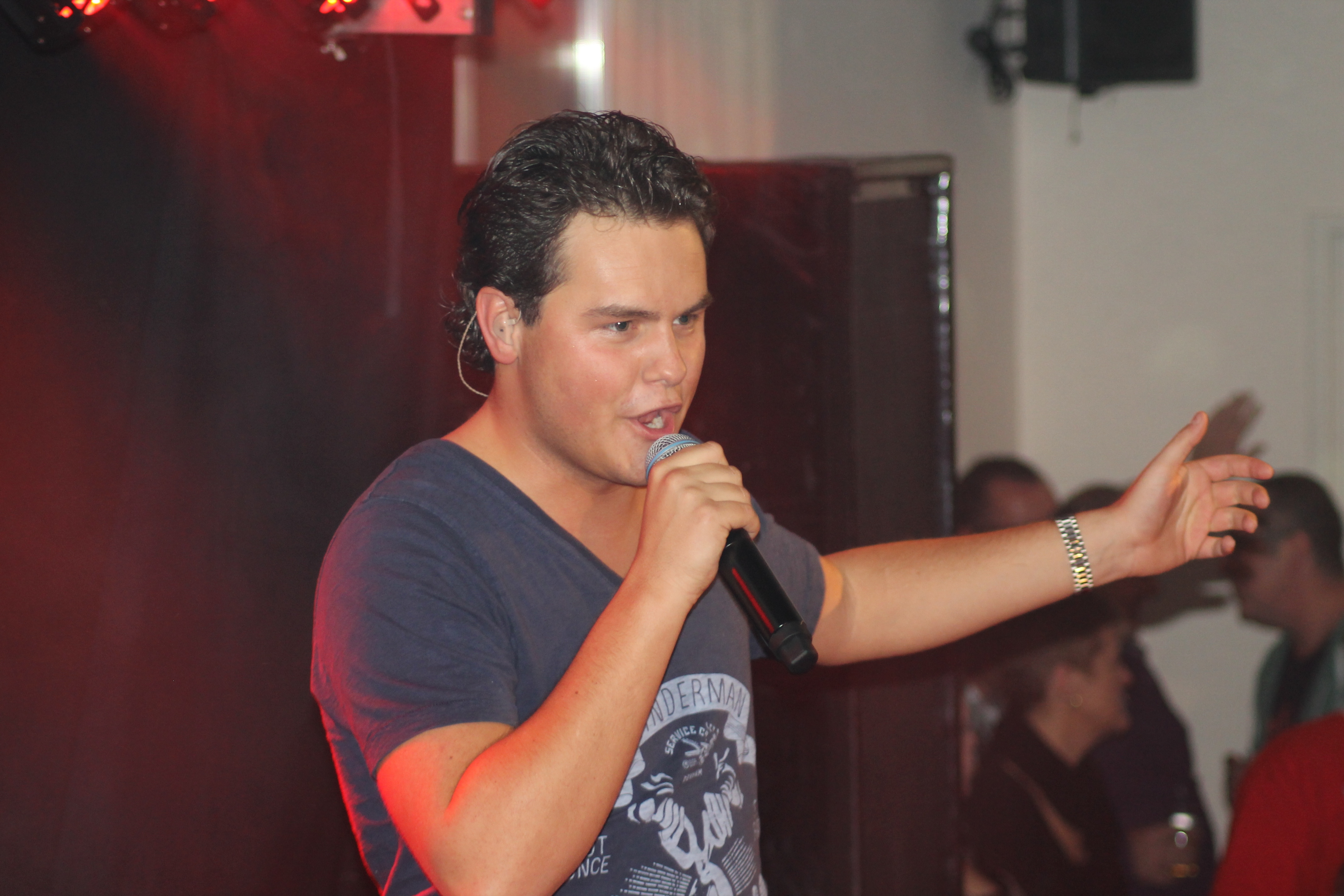 Henk Dissel in Goirle